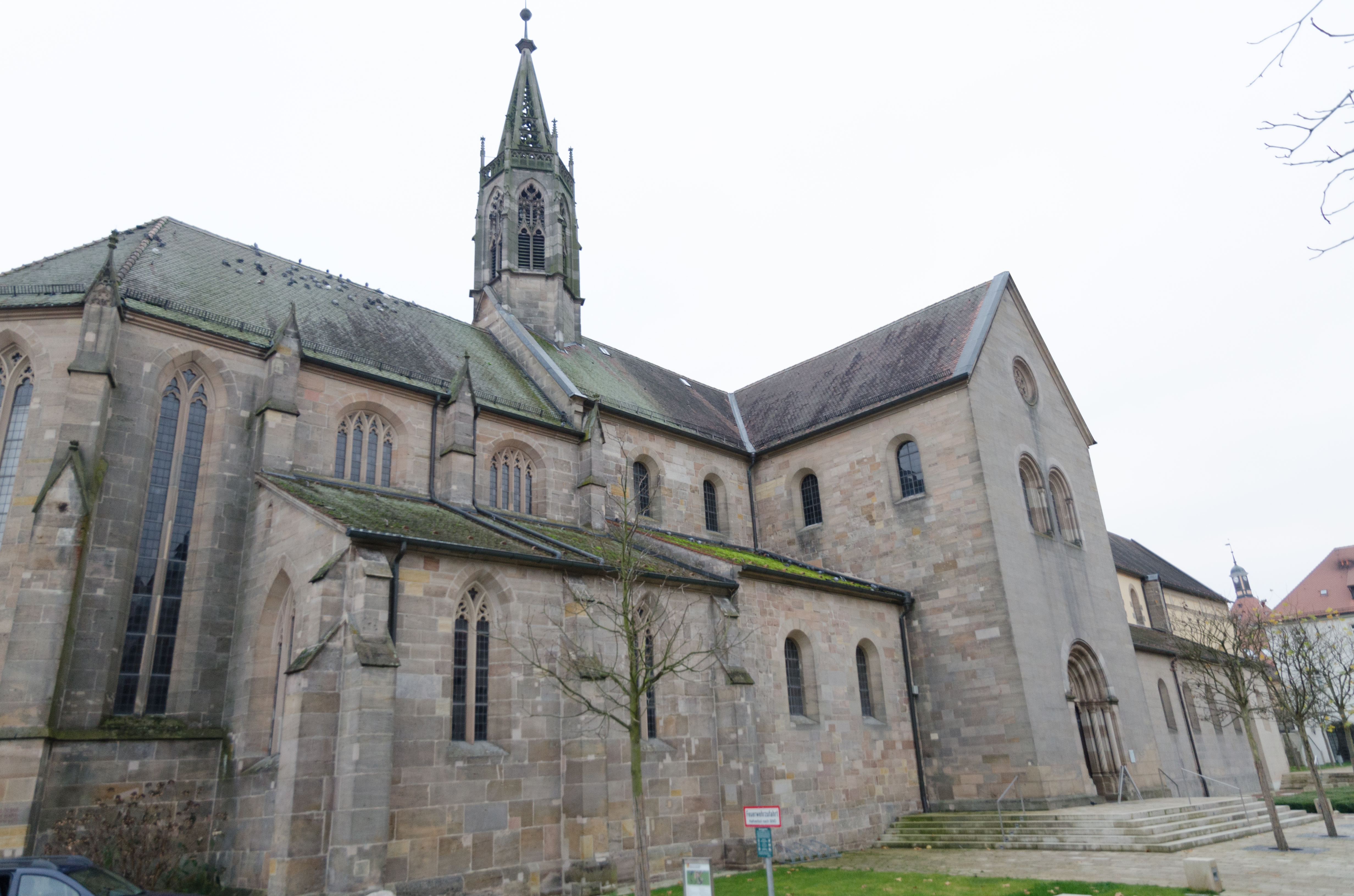 Heilsbronner Münster